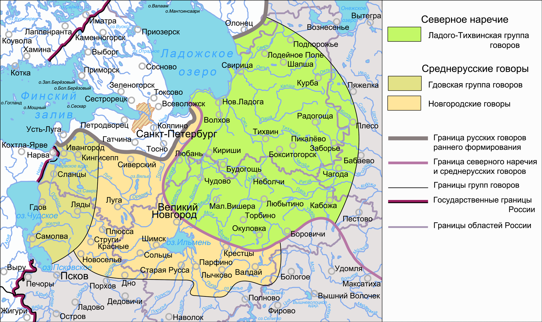 Карта говоров русского языка северо-западного региона (Ладого-Тихвинская группа, Гдовская группа и Новгородские говоры) по диалектологической карте 1965 года. На основе данных: Захарова К. Ф., Орлова В. Г. Диалектное членение русского языка. М.: Наука, 1970. 2-е изд.: М.: Едиториал УРСС, 2004 Русские. Монография Института этнологии и антропологии Федеральная целевая программа Русский язык. Региональный центр НИТ ПетрГУ